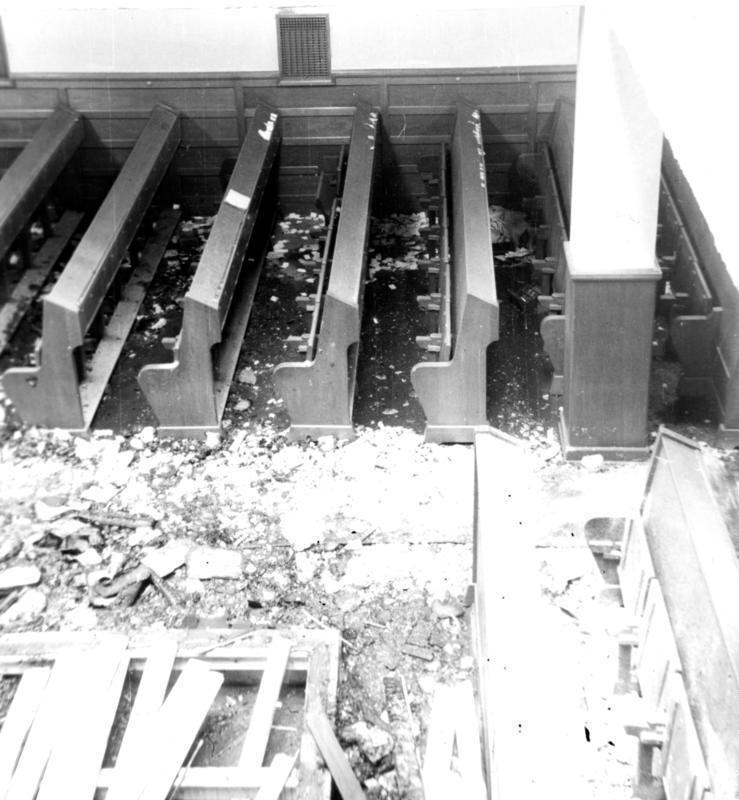 Berlin, Verwüstete Synagoge Berlin, Fasanenstraße (?).- Reichsprogromnacht ("Reichskristallnacht") am 9.11.1938, Innenraum einer verwüsteten Synagoge mit Bänken